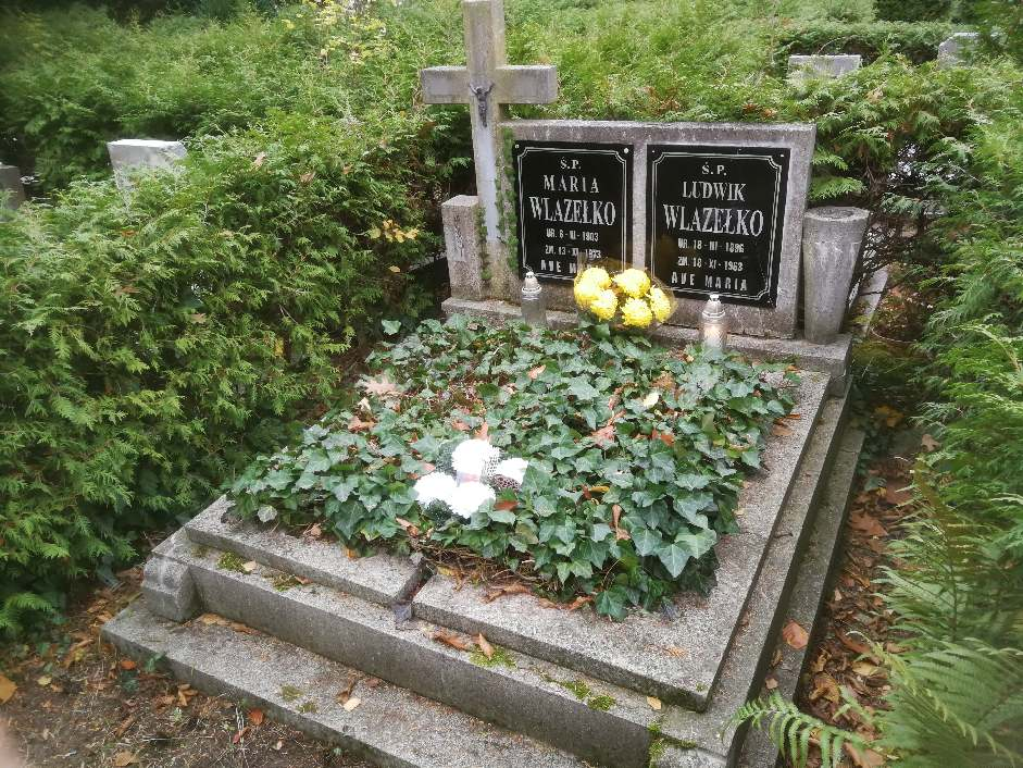 Grób majora Ludwika Wlazełko na szczecińskim Cmentarzu Centralnym (na tablicy błędna data urodzenia).